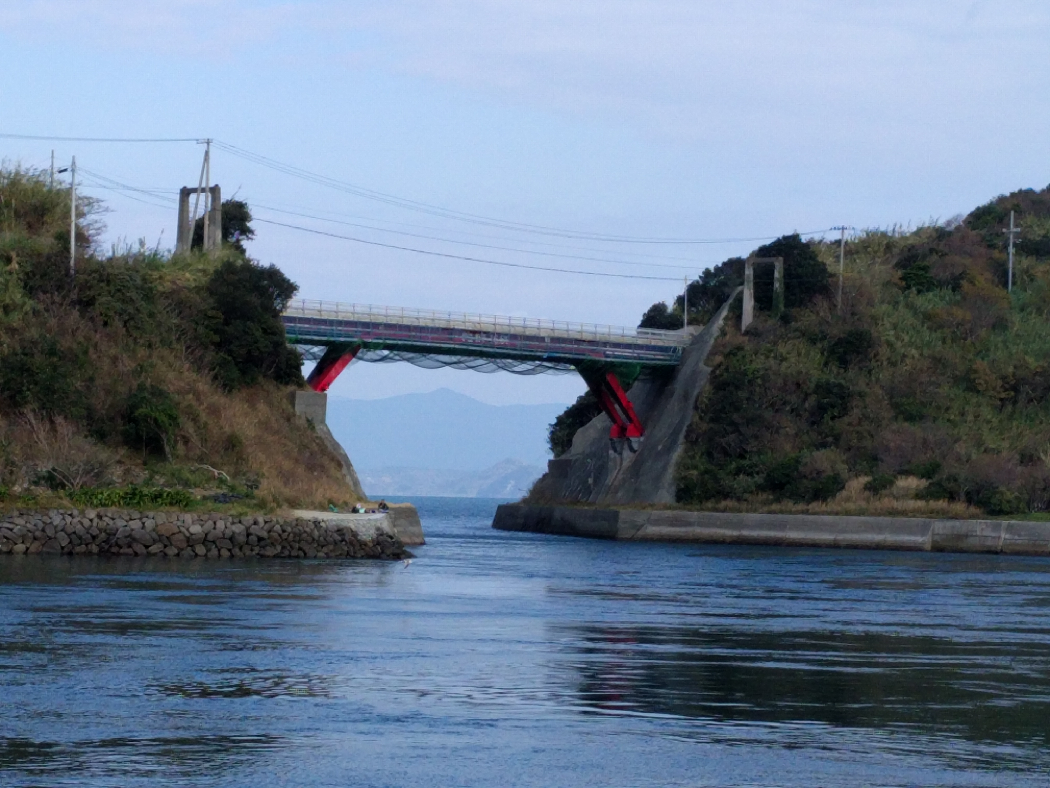 2017年撮影